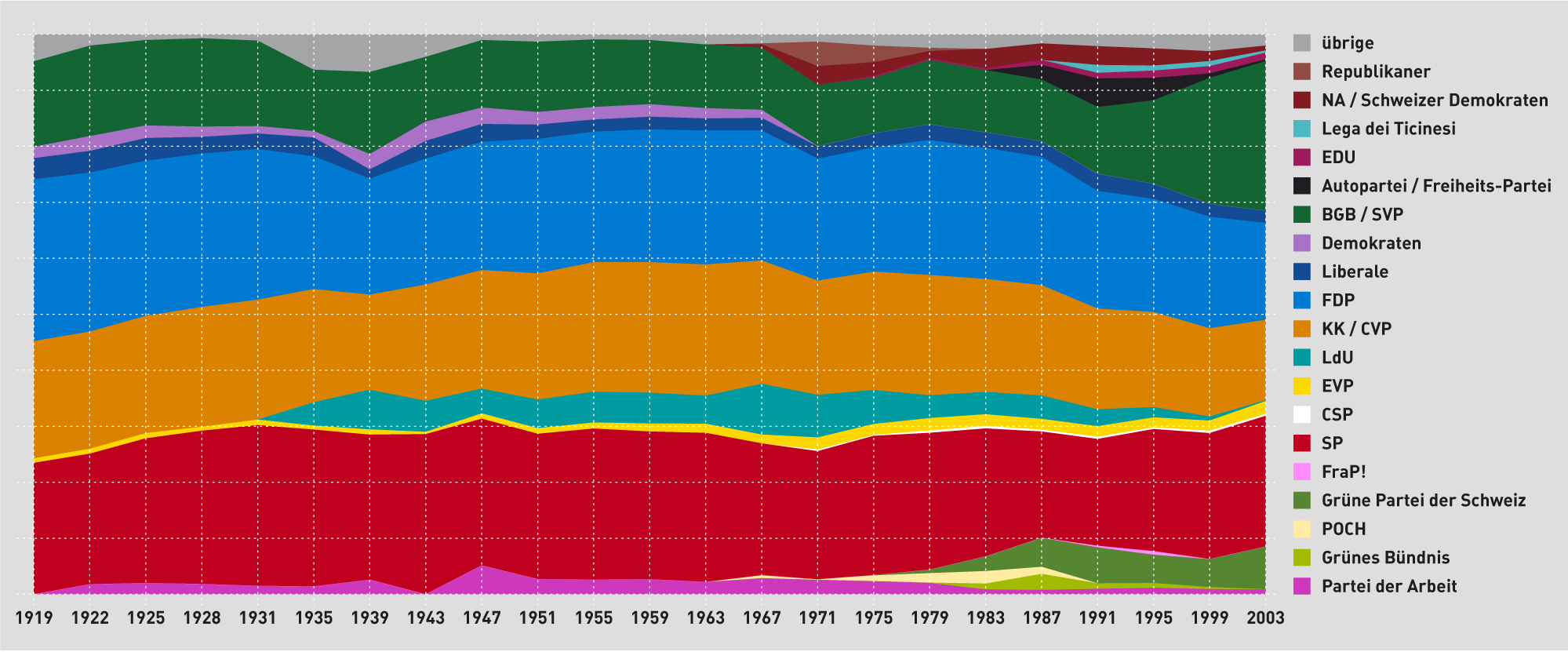 Wähleranteil der Parteien im Schweizer Nationalrat, 1919-2003